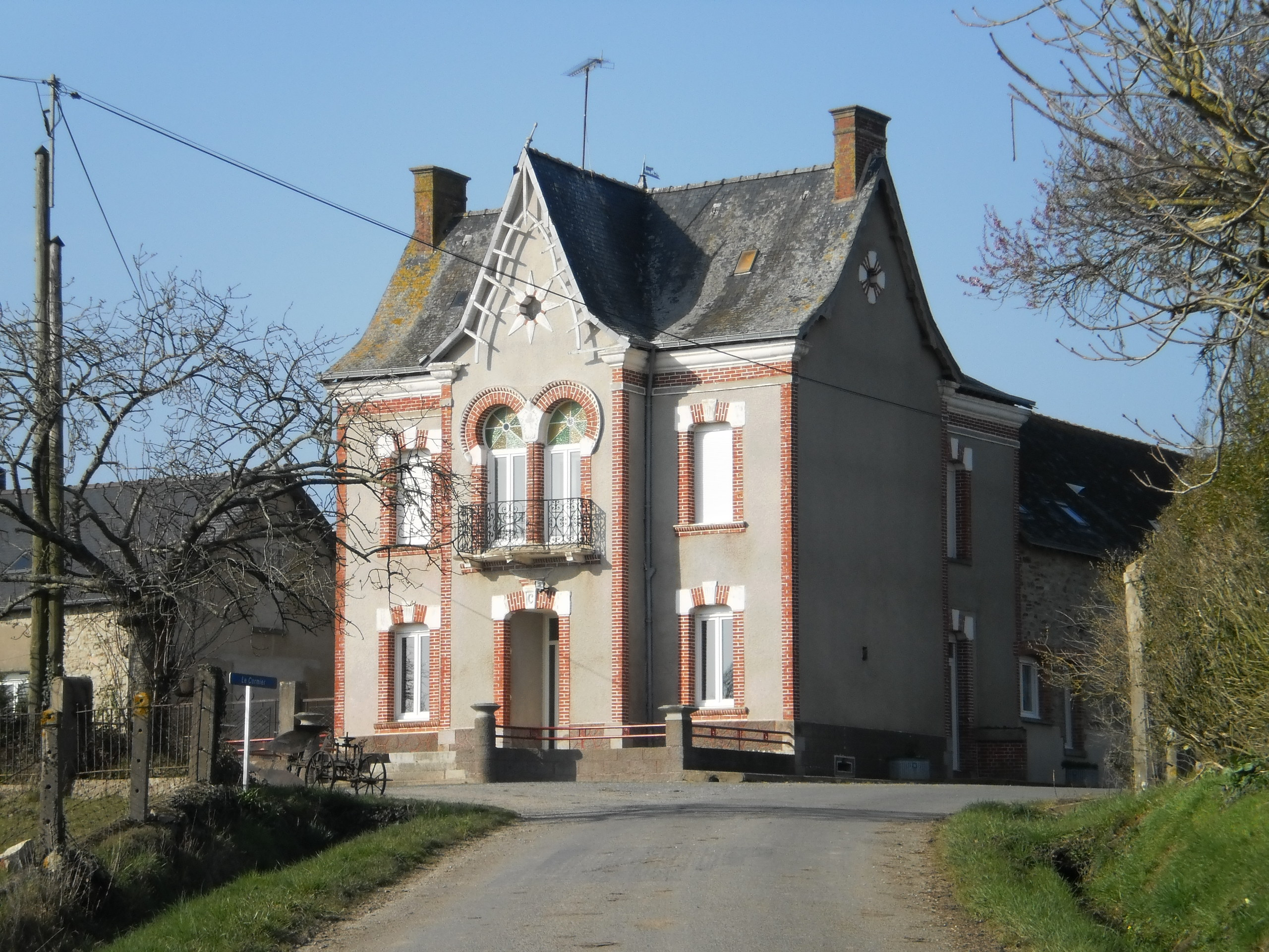 Noyal-sur-Brutz (Loire-Alantique, France) - maison de maître